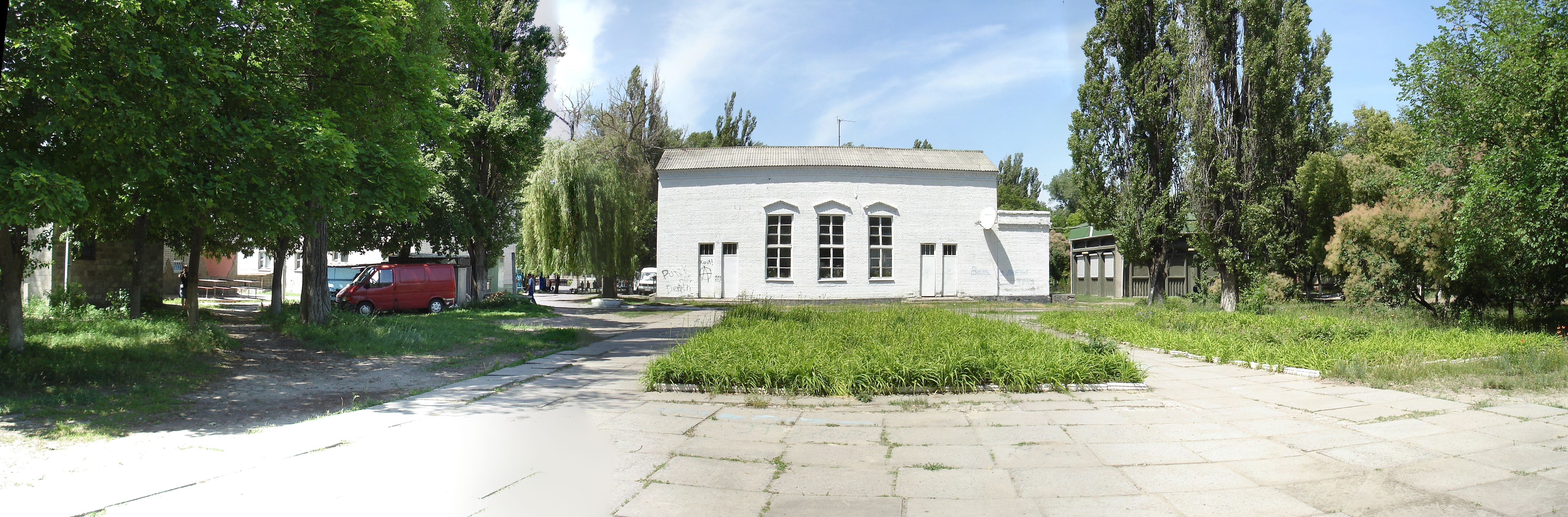 смт. Власівка, колишній Будтнок піонерів